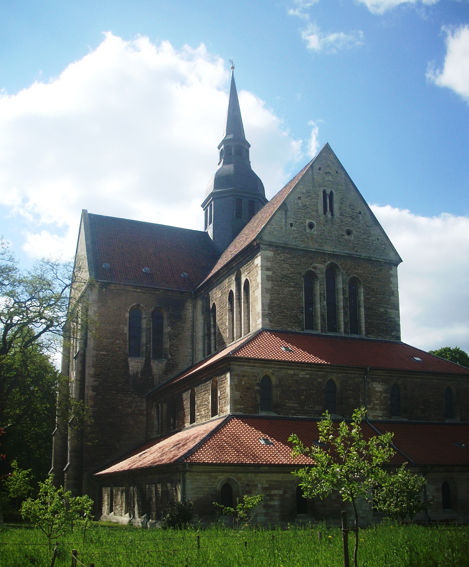 Riddagshausen Klosterkirche von Südosten